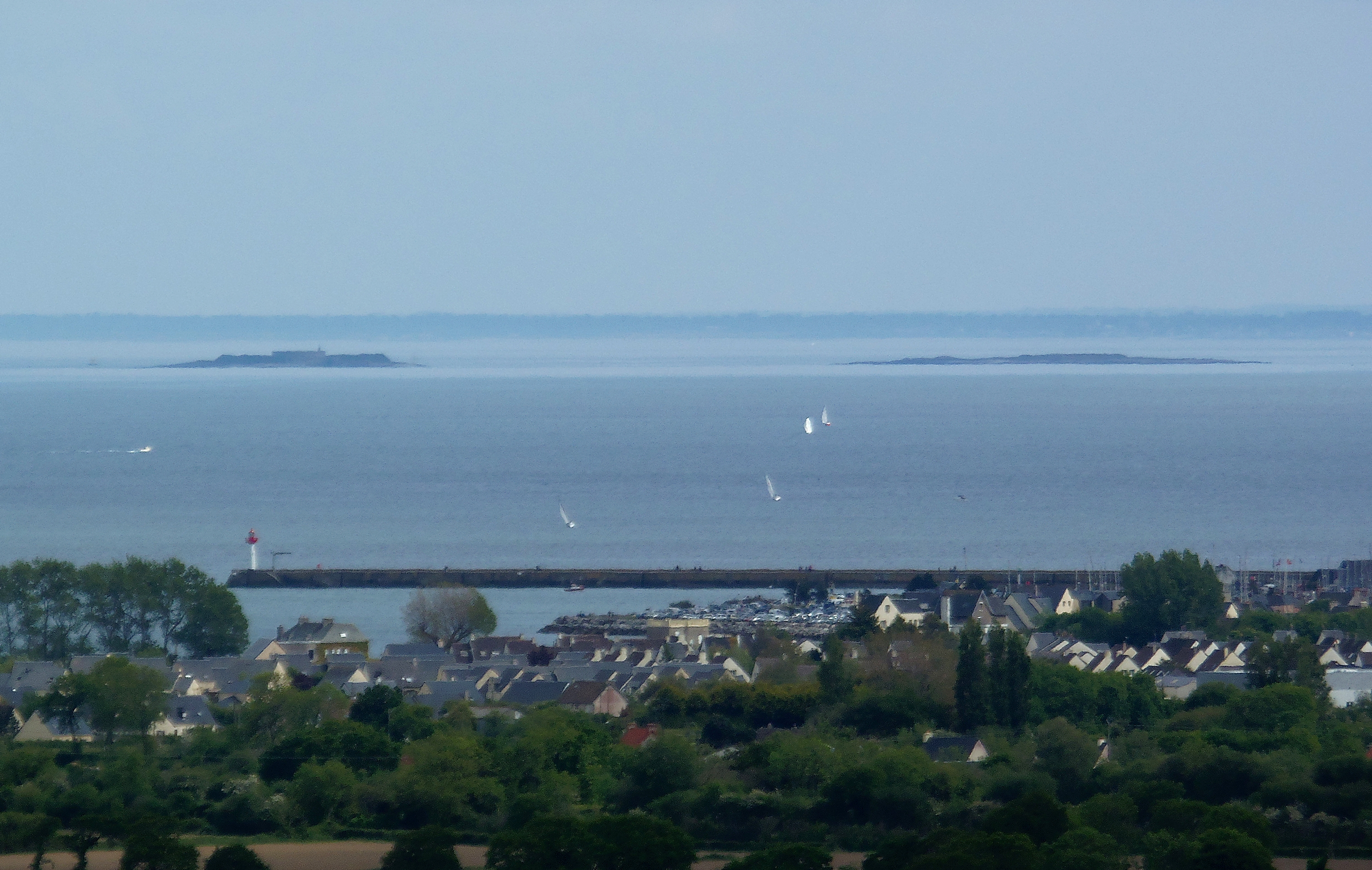 La Pernelle (Normandie, France). Vue sur la jetée de Saint-Vaast, les îles Saint-Marcouf et la côte du Bessin.